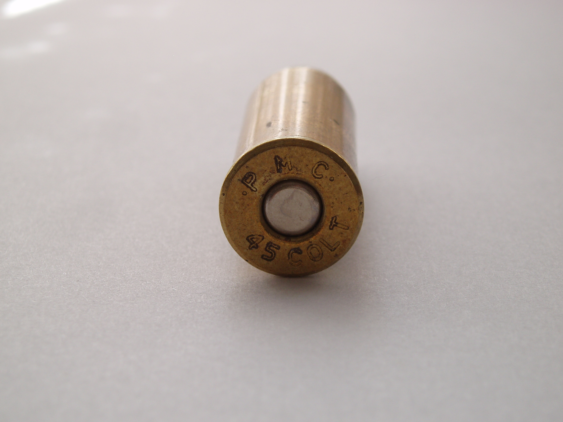 .45 Colt cartridge.